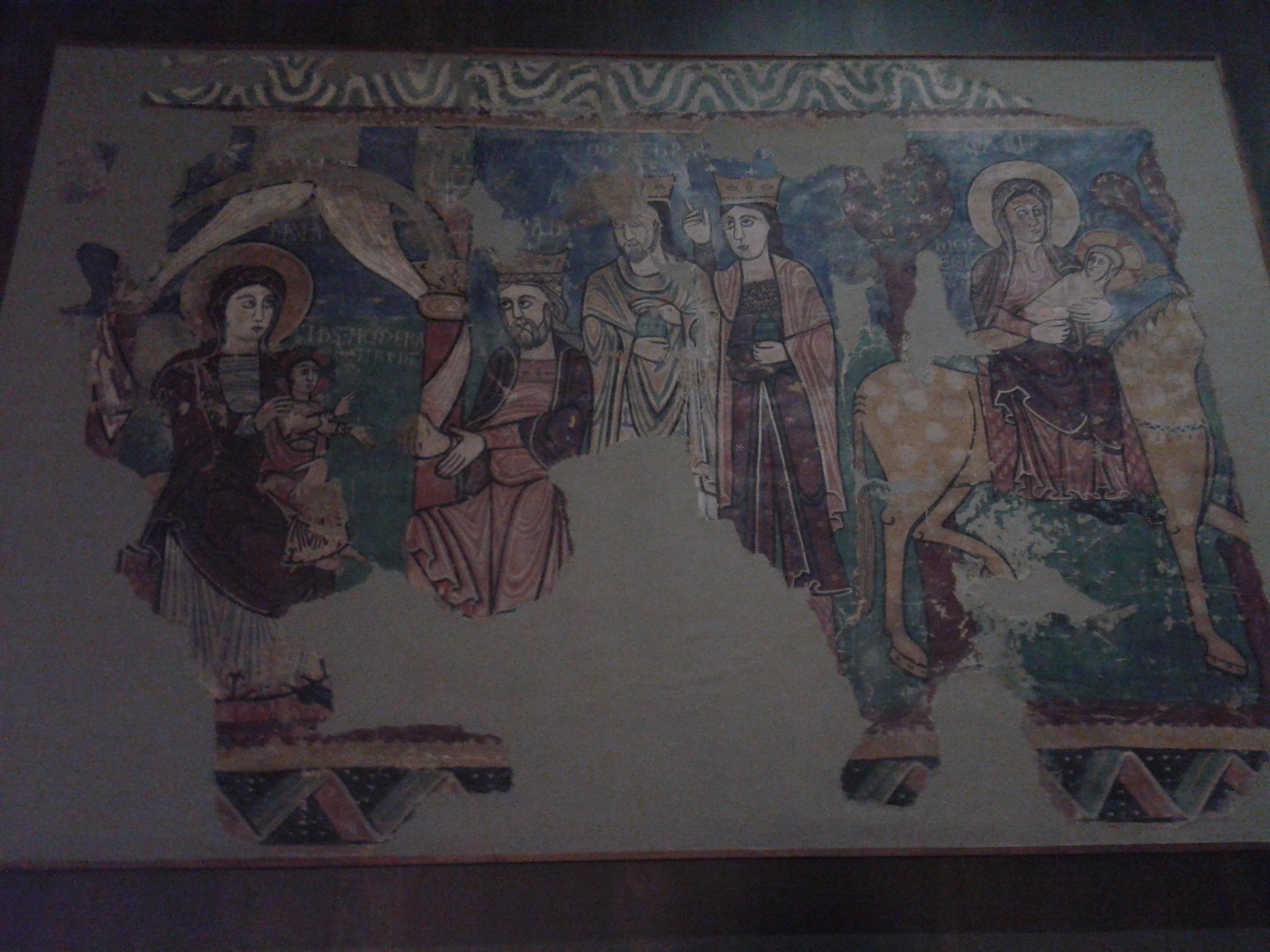 Fragmento de pintura mural de la iglesia de Nava. Actualmente en el Museo Diocesano de Jaca